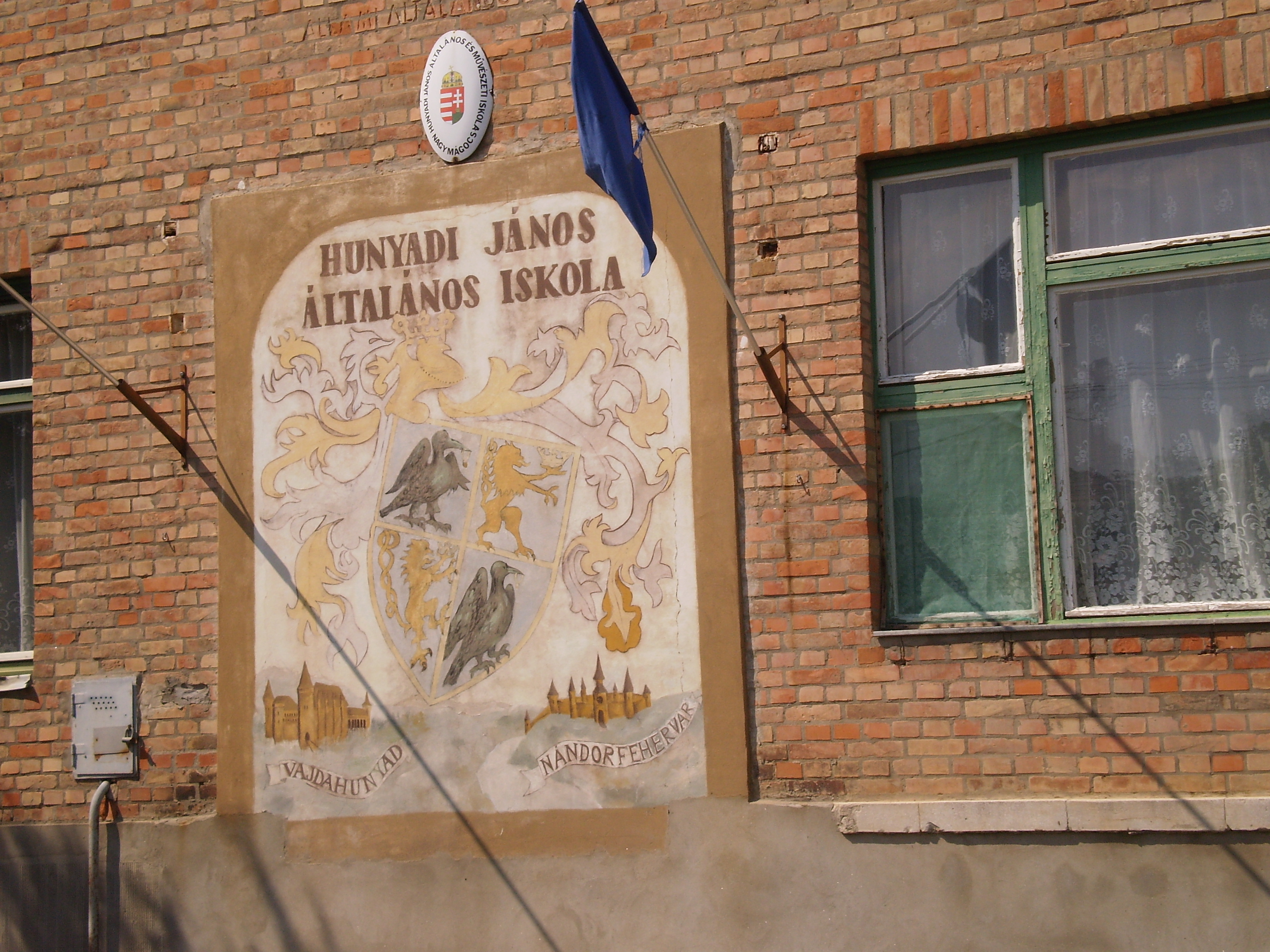 A nagymágocsi Hunyadi János Általános Iskola épületének oldala, amin látható a Hunyadiak címere is.